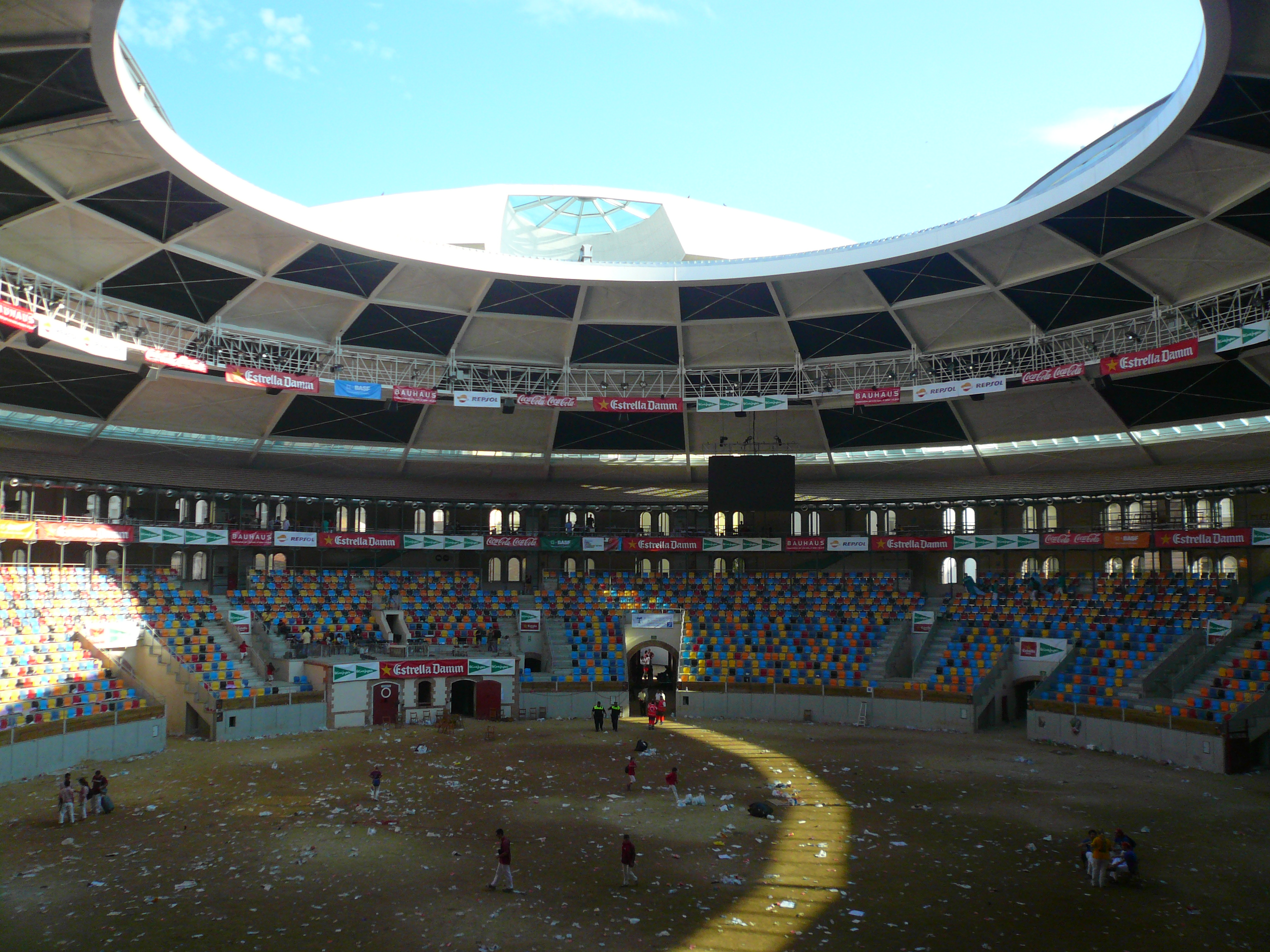 Concurs de Castells de Tarragona 2012, a la Plaça de Toros, o Plaça de Braus. c/ Eivissa - c/ Jaume I - c/ Mallorca (Tarragona). Object location41° 06′ 51.64″ N, 1° 14′ 43.03″ E